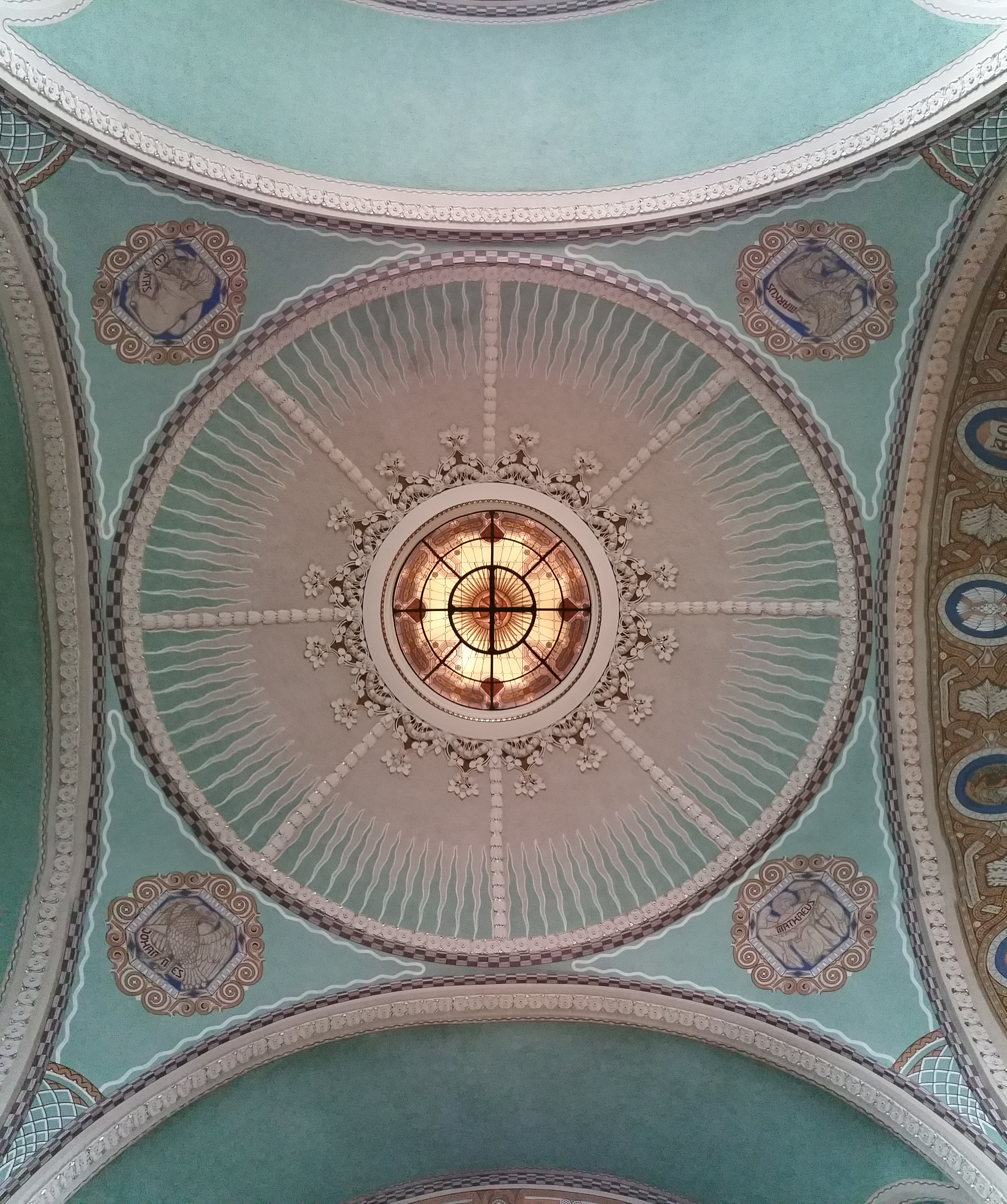 senkrecher Blick nach oben in die Kuppel mitsamt den vier Evangelisten, evangelische Immanuel-Kirche Dortmund Marten